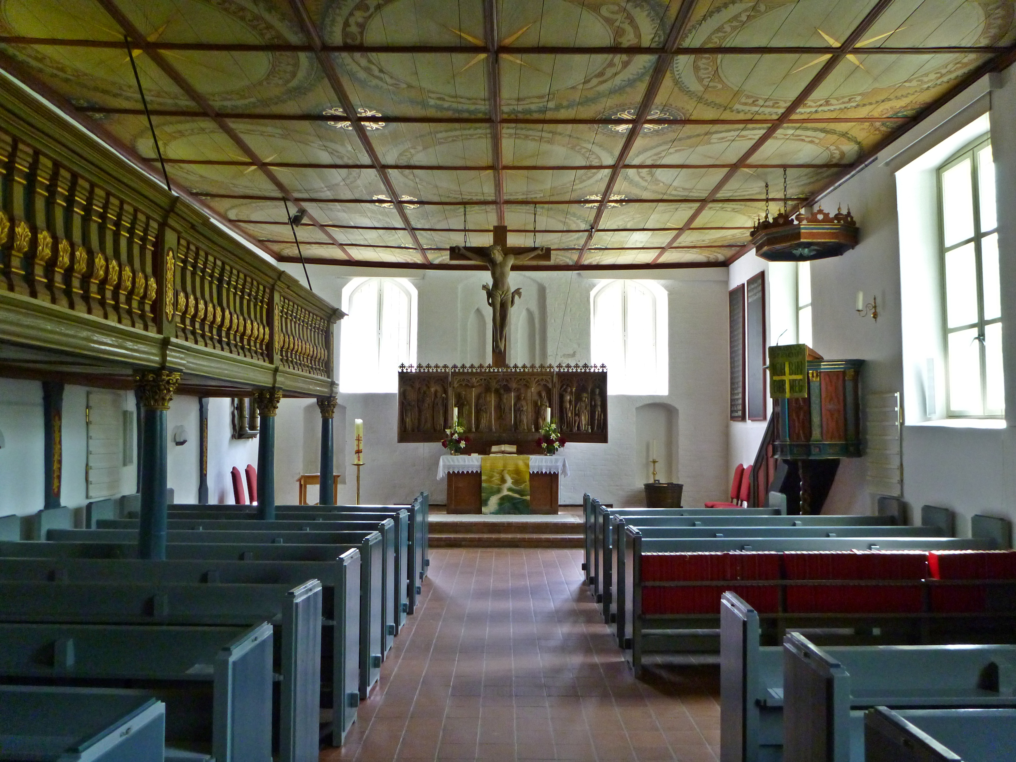 Altar der Flintbeker Kirche